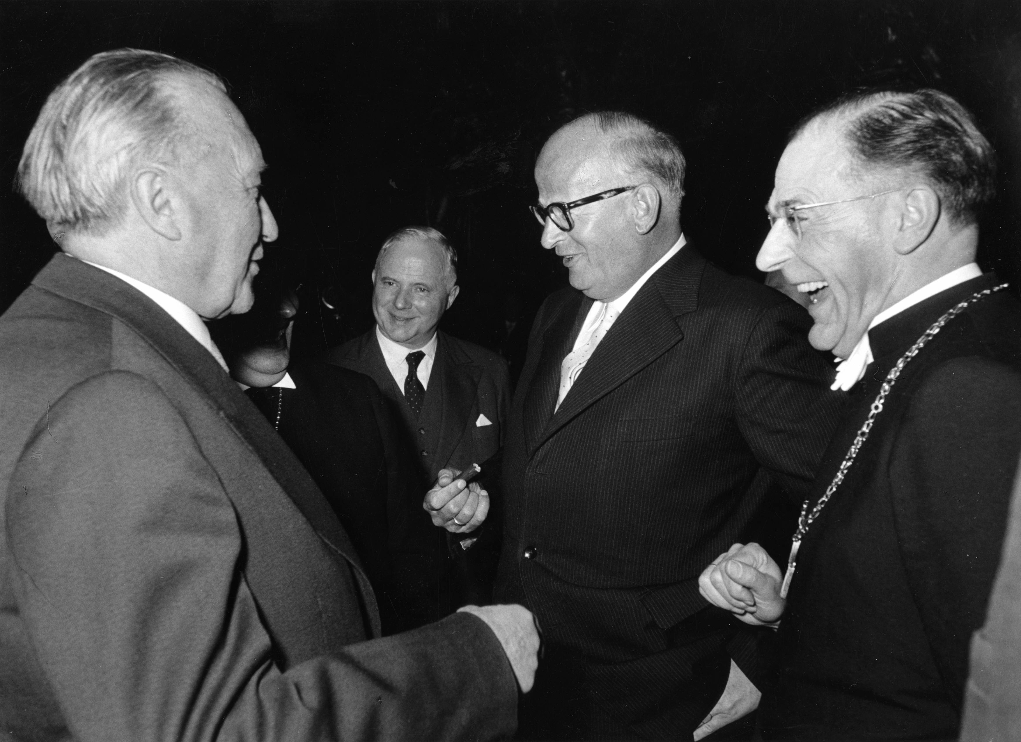 Adenauer, Konrad7. CDU-Bundesparteitag, 12.05.1957 - 15.05.1957